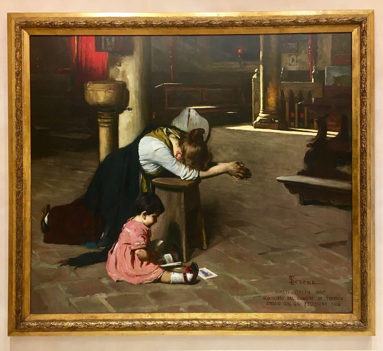 "Vittime" (ante 1897), dipinto di Luigi Serena (1855-1911) conservato al Museo Bailo di Treviso e ambientato nella chiesa di Santa Lucia (Treviso)